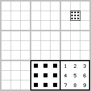 Sudoku